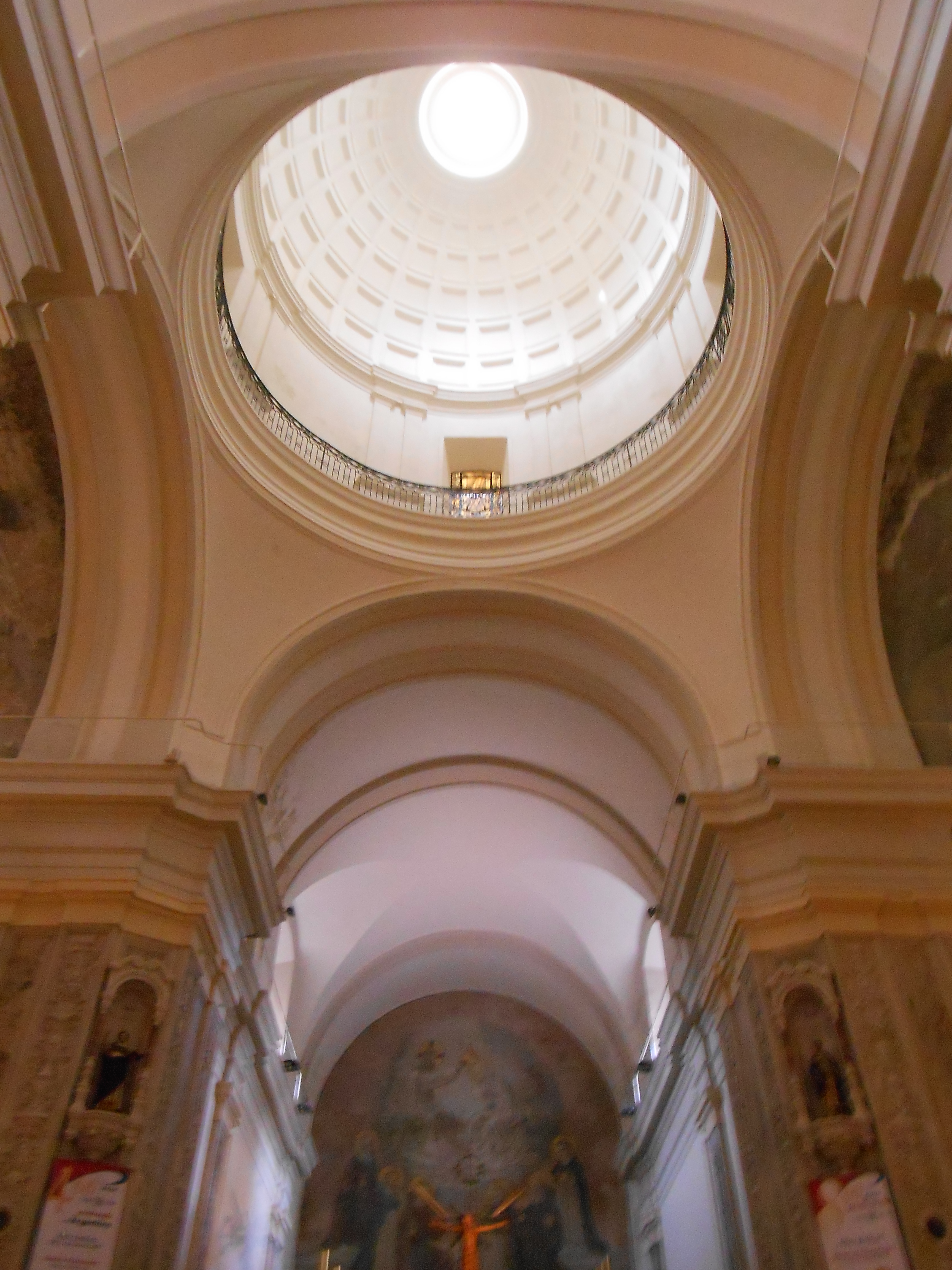 Interior de la Basílica Nuestra Señora del Rosario, en el barrio de San Telmo